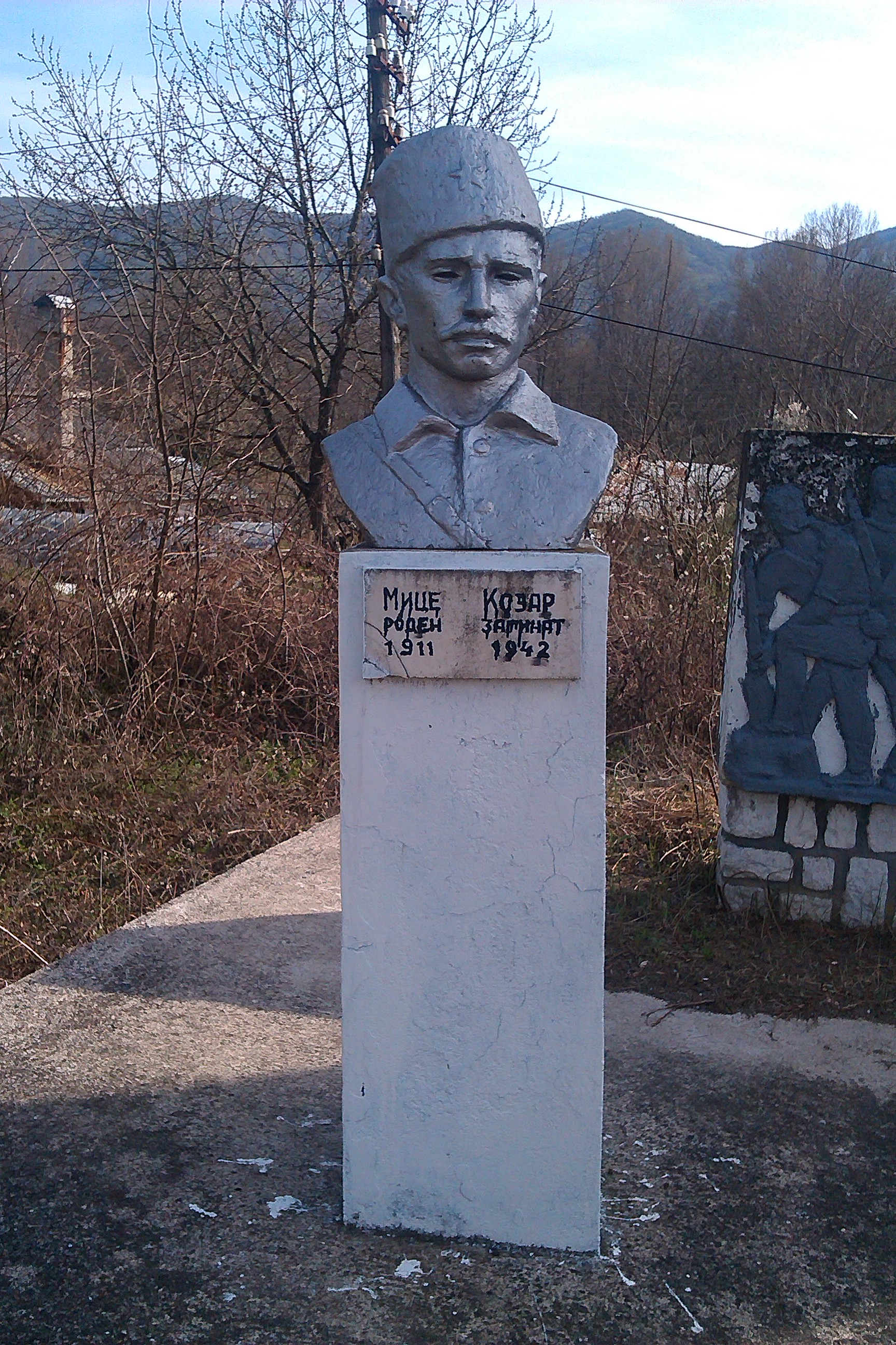 Споменик на Мице Козар во Богомила